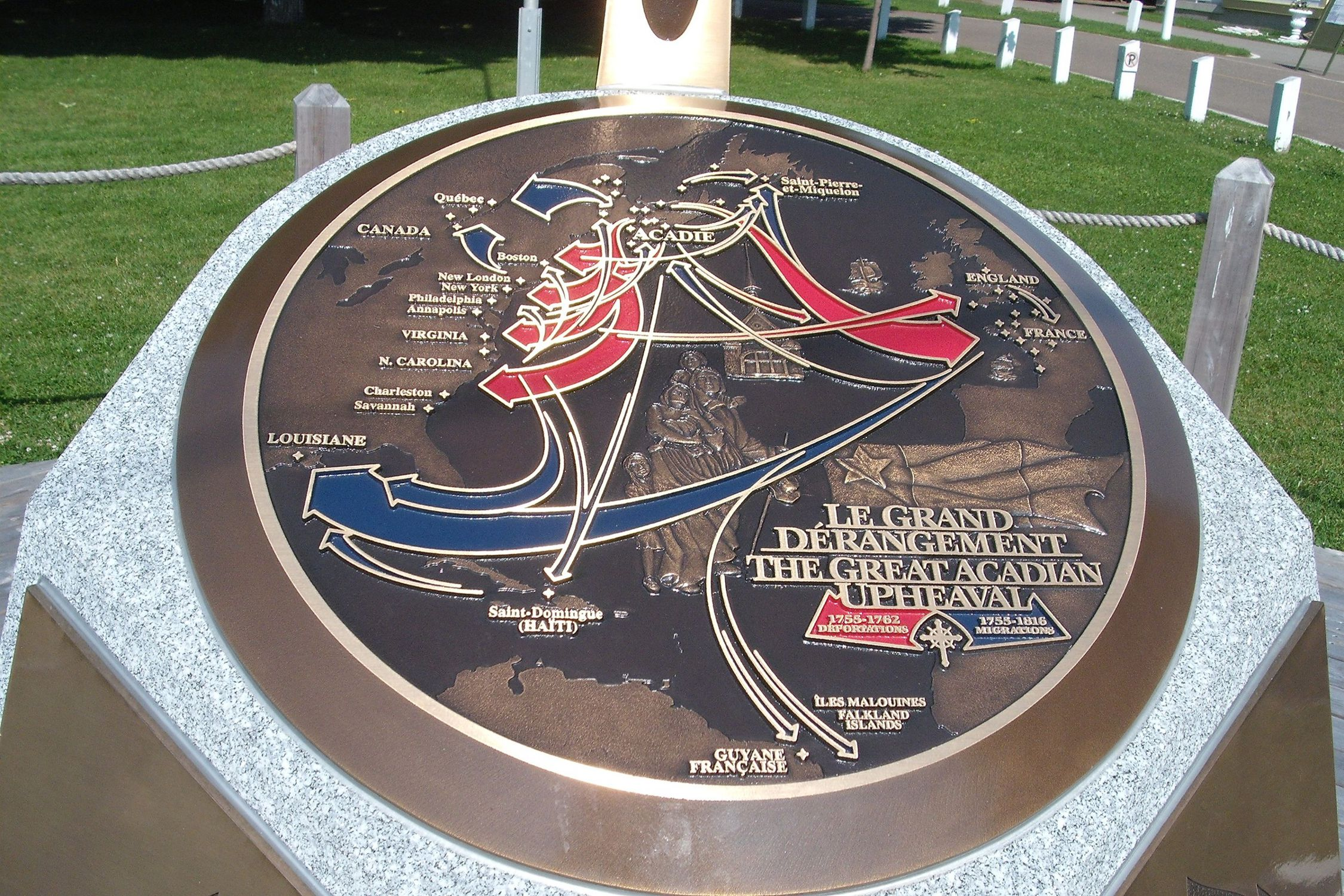 Monument à la déportation des Acadiens à Sainte-Anne-du-Bocage (Caraquet, NB)